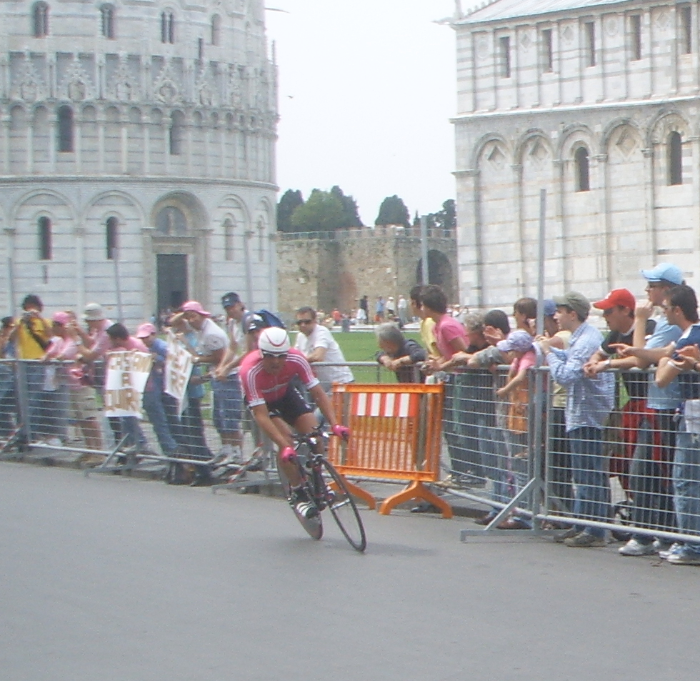 Ullrich in Piazza dei Miracoli nel Giro 2006 "Foto scattata da me (Pepp.cristiano 23:59, 22 mag 2006 (CEST), Giuseppe Cristiano), la rilascio nel pubblico dominio"